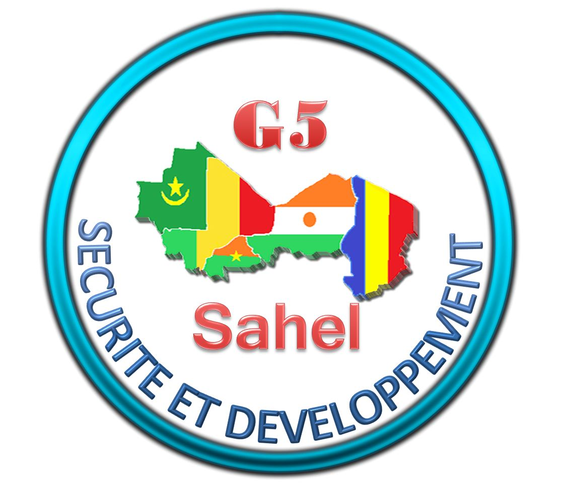 Logo Officiel du Secrétariat permanent du G5 Sahel